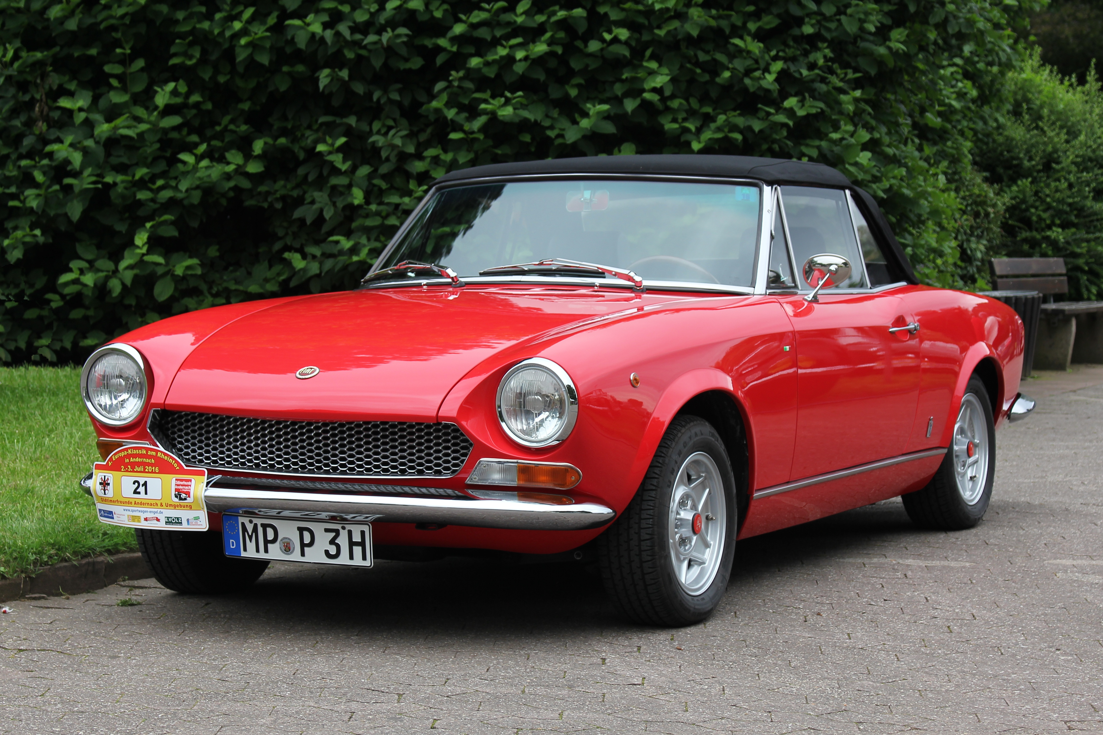 Fiat 124 Spider, Baujahr 1970, 1,4-Liter-Motor, 90 PS (fiktives Kennzeichen)